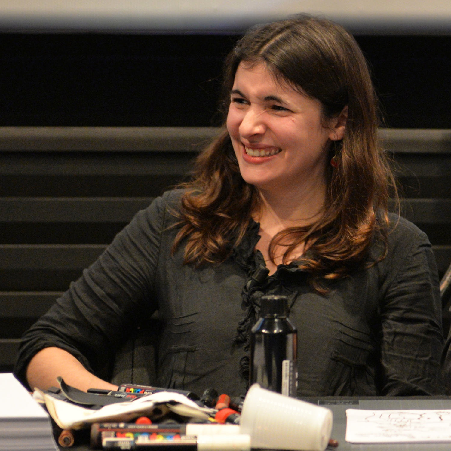 Laetitia Coryn au Festival International de la BD d'Angoulême, 29 janvier 2015.